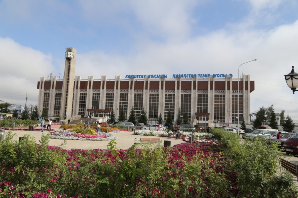 Вокзал Кокшетау